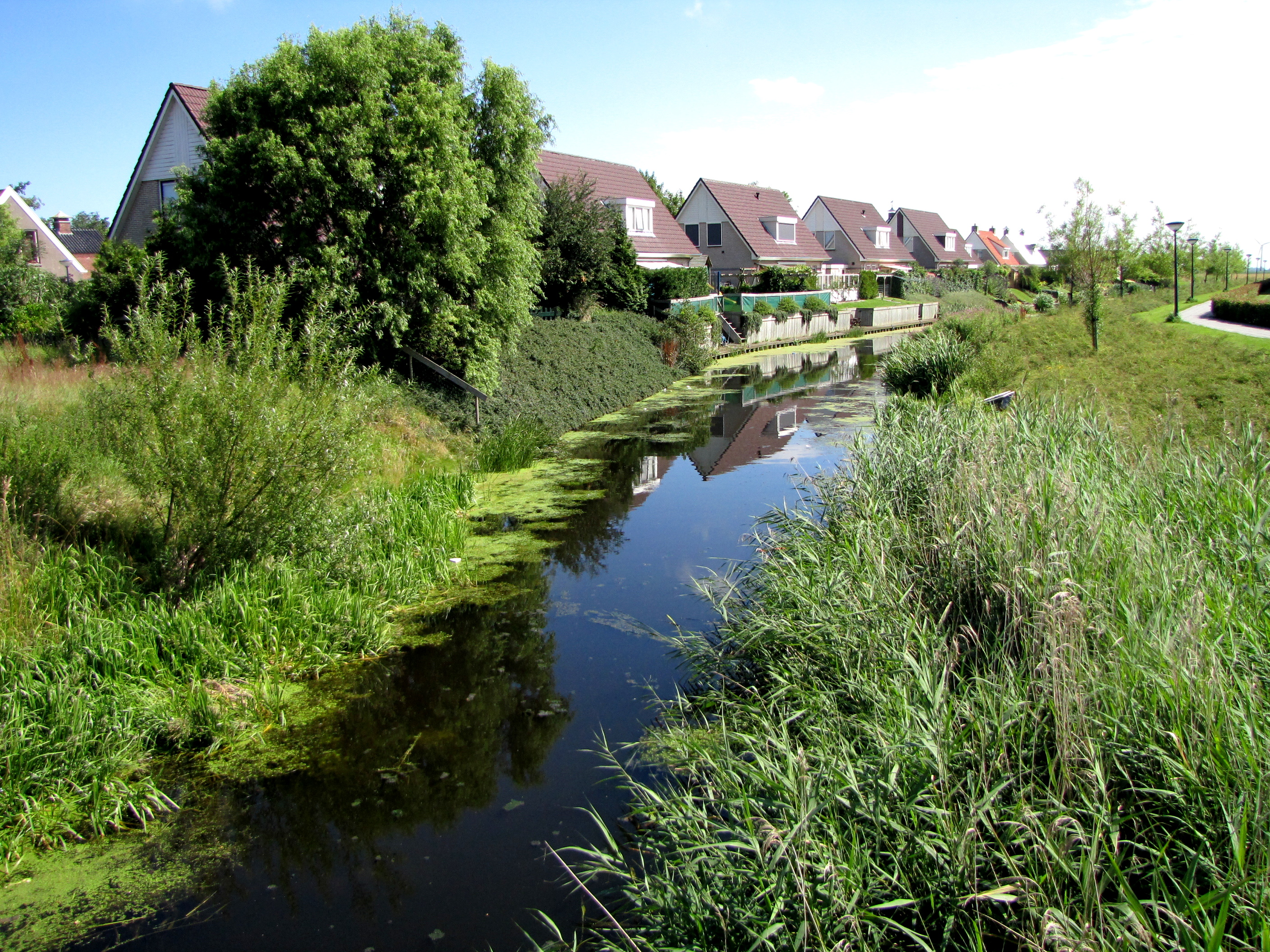 Sexbierum